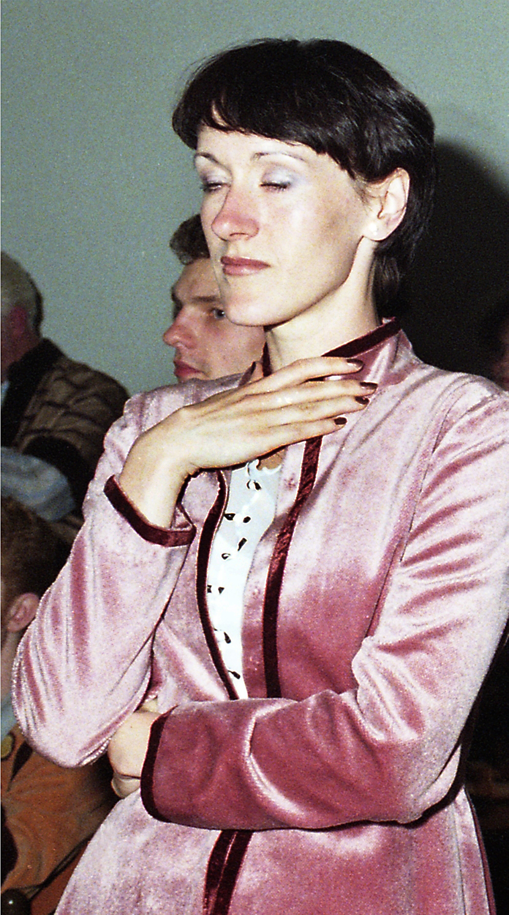 Pirjo Levandi. eesti laulja (sopran) 99